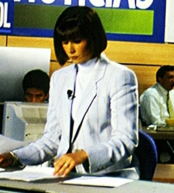 María Cristina Uribe en el estudio de Noticias Caracol en 1998.